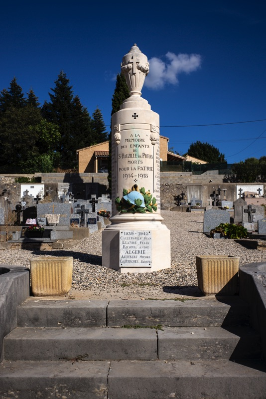 Monument aux morts - Archives départementales de l’Hérault - FRAD034-2458W-Saint-Bauzille-De-Putois-001